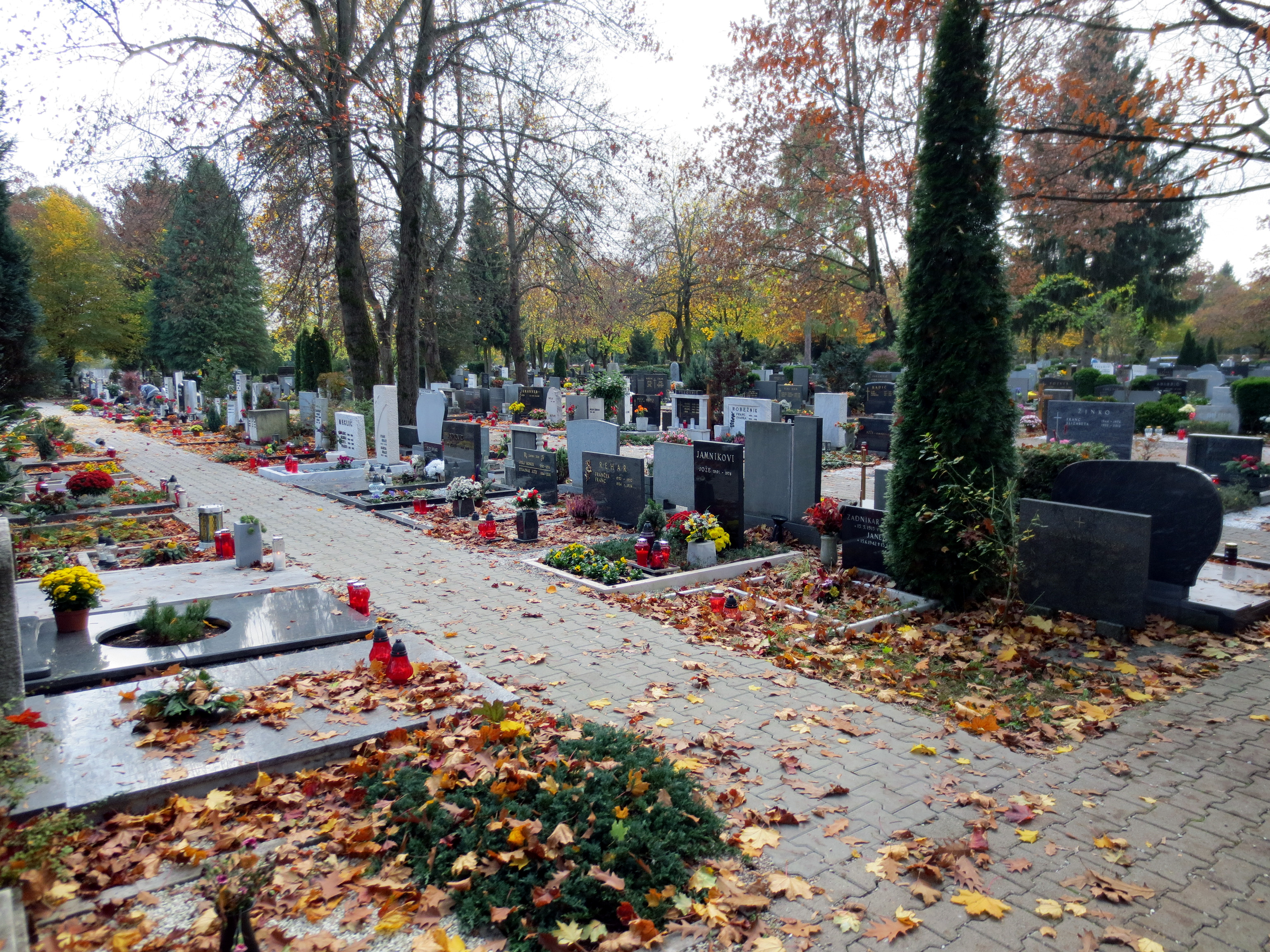 Žale